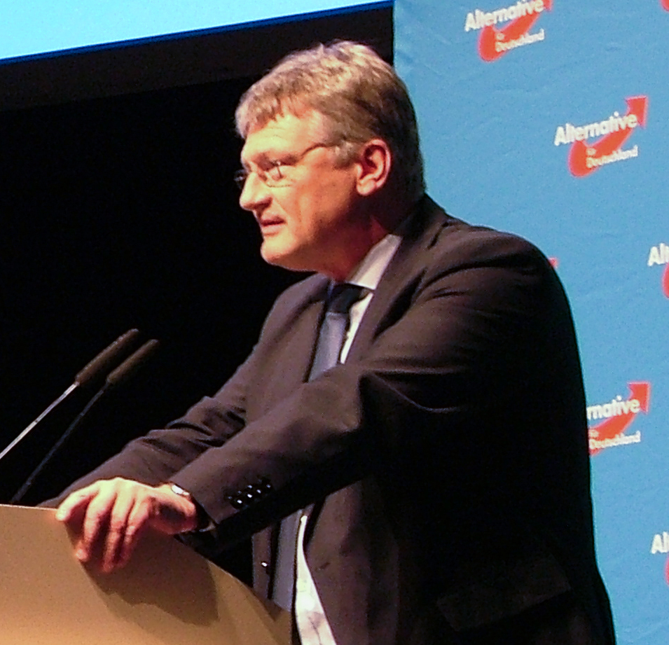 AfD Bundesparteitag am 23. April 2017 in Köln, MARITIM Hotel: Jörg Meuthen, Frauke Petry